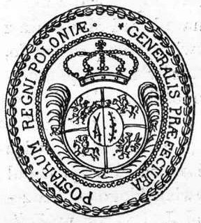 Ilustracja Encyklopedii staropolskiej T.4 044 - Pieczęć prefektury poczt Rzeczypospolitej